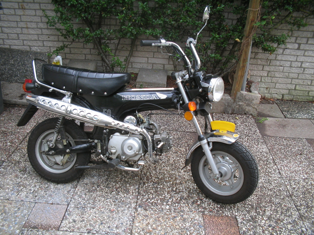 Jincheng JC50 Q50, een imitatie Honda Dax, eigen brommer